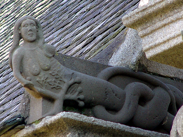 Sizun (Bretagne, Finistère) Schlange mit Frauenkopf am Giebel der Begräbniskapelle. Auf dem Körper im Flachrelief Zweig des Apfelbaumes. Die Schlange erscheint im MA. nach apokrypher Überlieferung (Schatzhöhle Kap.4 und auch Legenda aurea) vielfach mit Frauenkopf oder -oberkörper ähnlich der Eva.